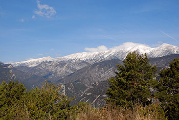 La Sierra de Cadi